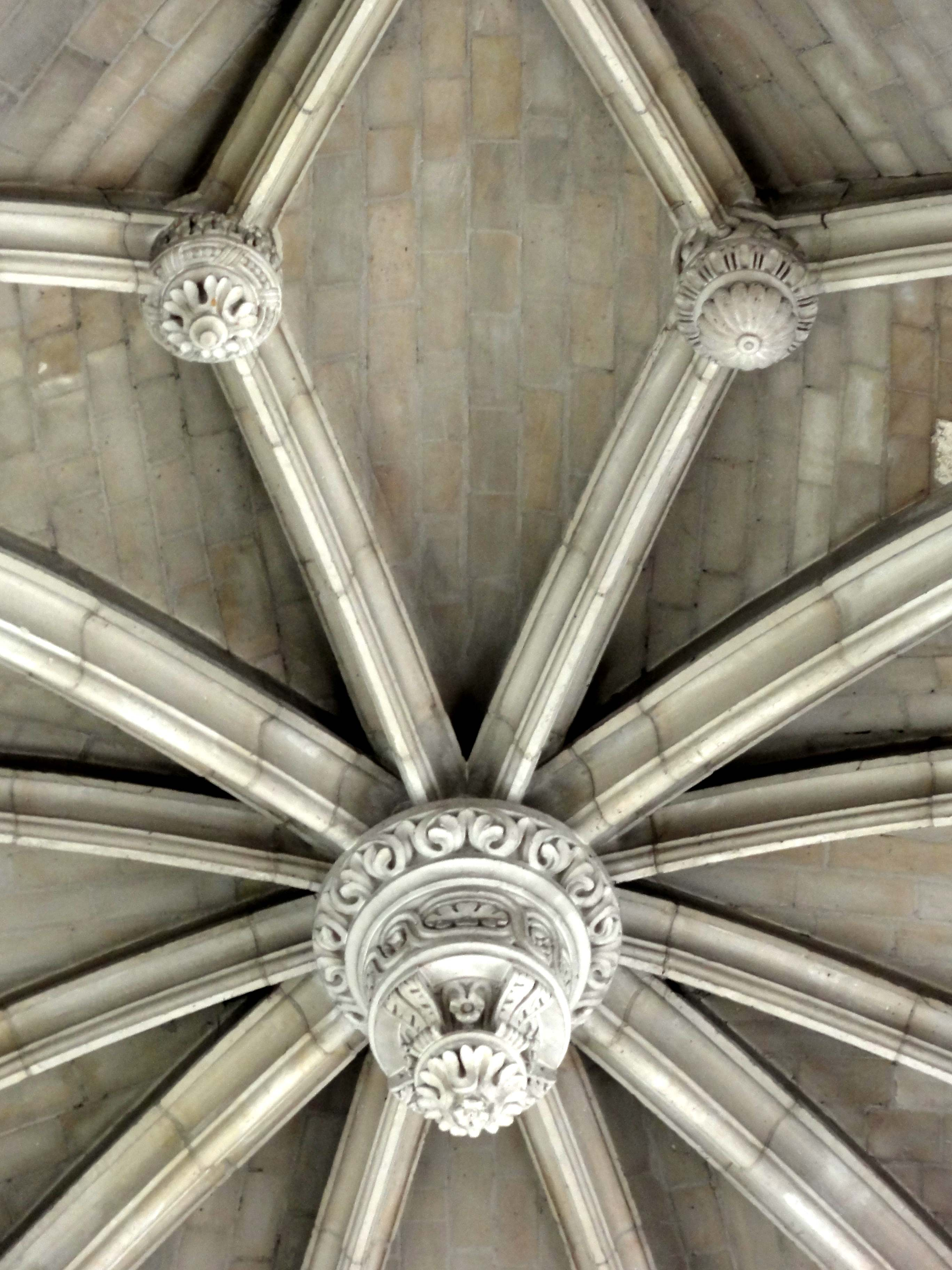 Vaisseau central, voûte de la 4e travée, clés de voûte.